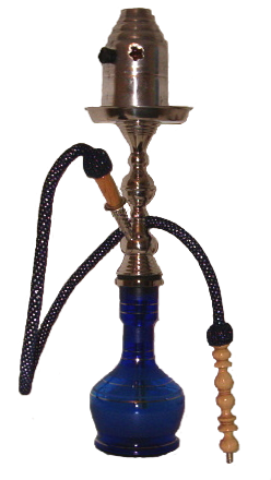 Shisha